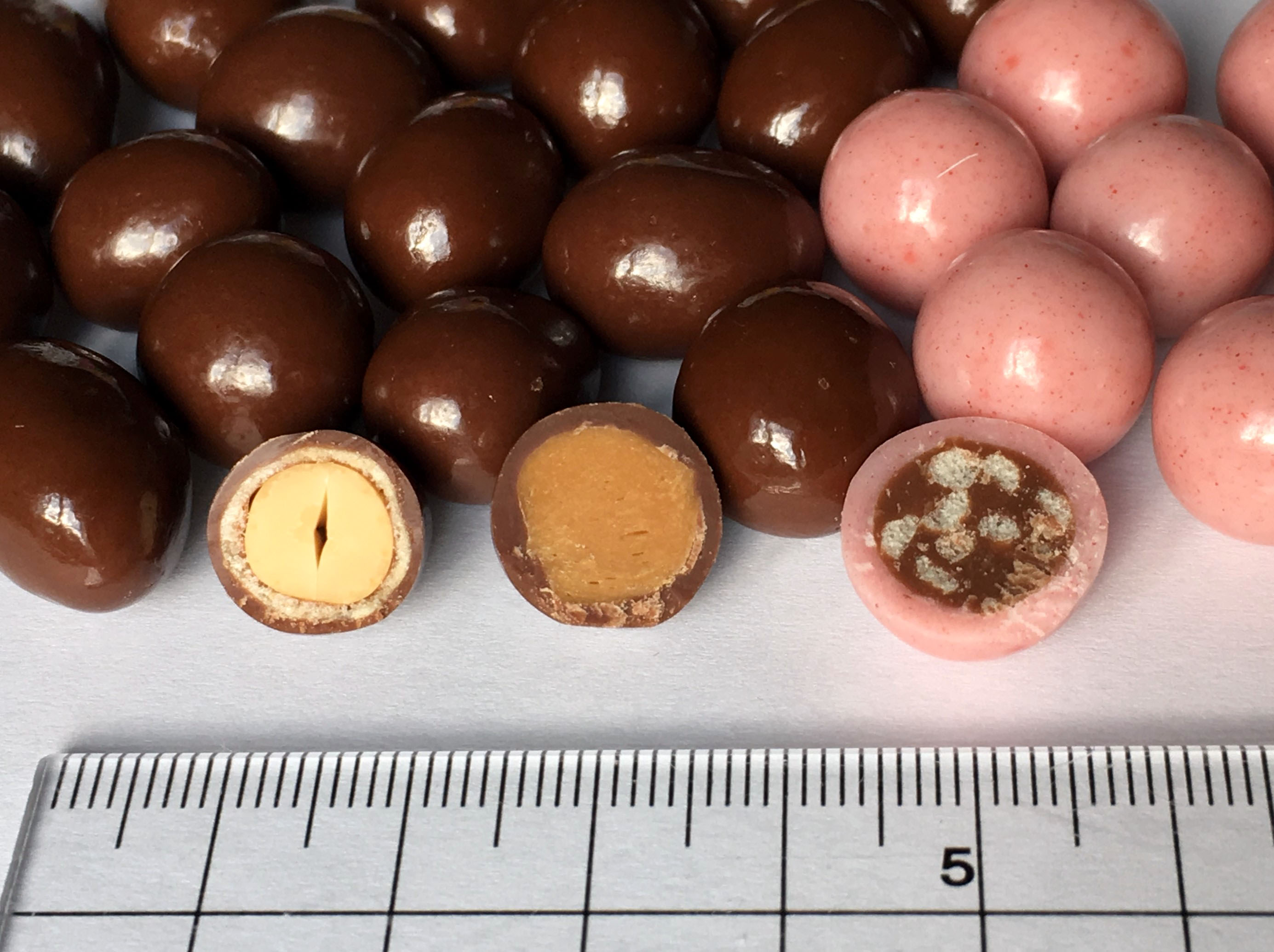 森永チョコボールの断面。左からピーナッツ、キャラメル、いちご。定規はセンチ尺。